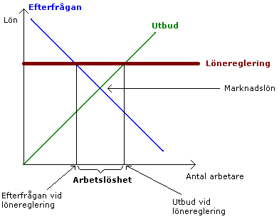 Den klassiska förklaringen till arbetslöshet: en lönereglering högre än marknadslönen skapar ett överskott av arbetare.